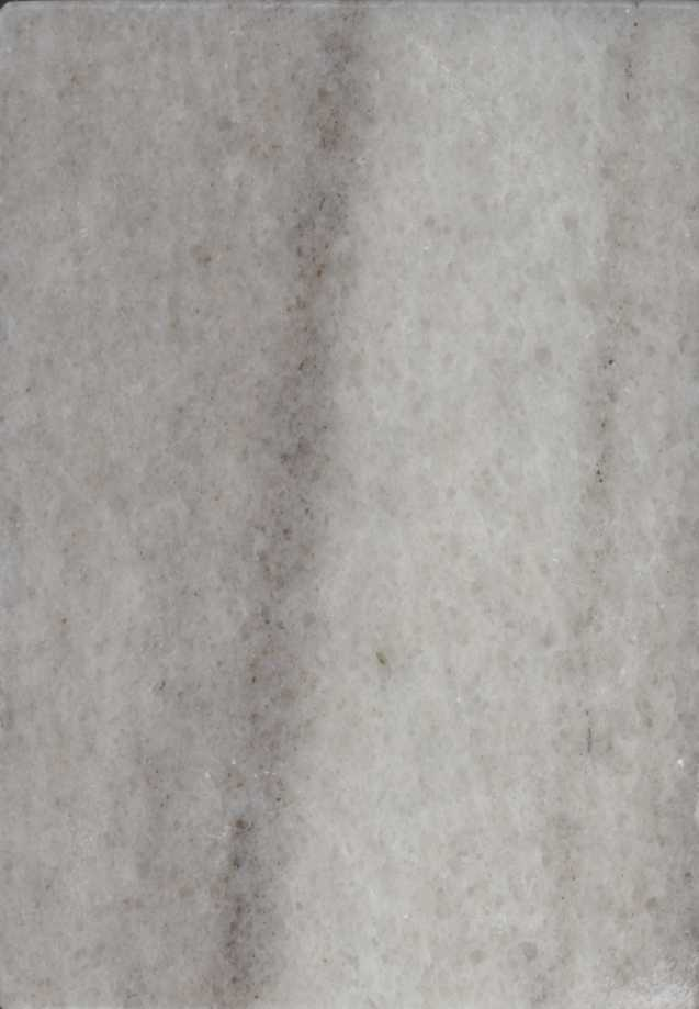 GroKu